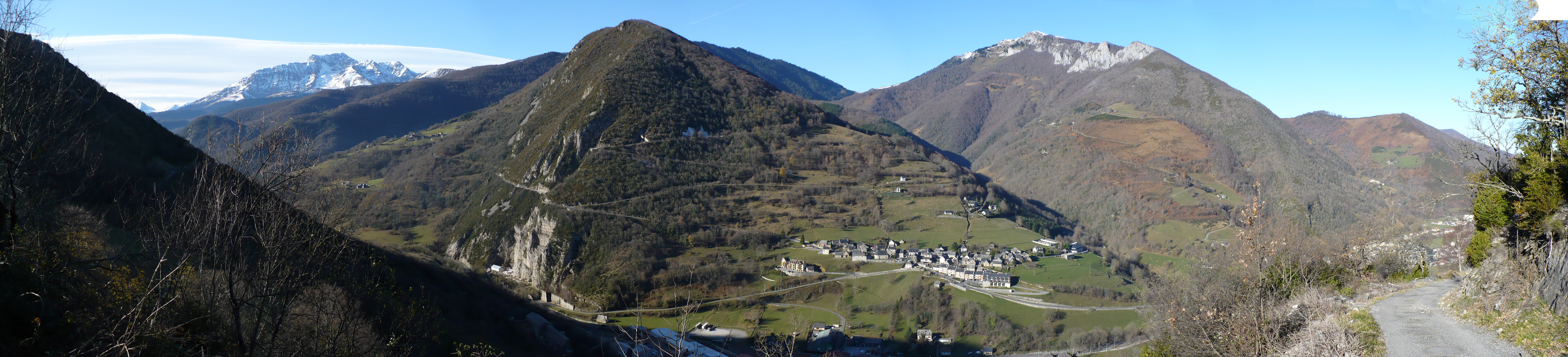 Пиренеи